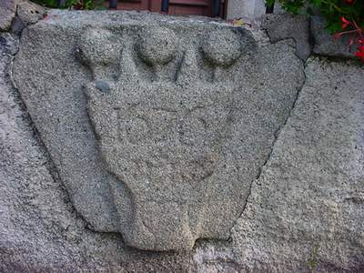 Vieille pierre se trouvant dans la commune de Ferrières-sur-Sichon